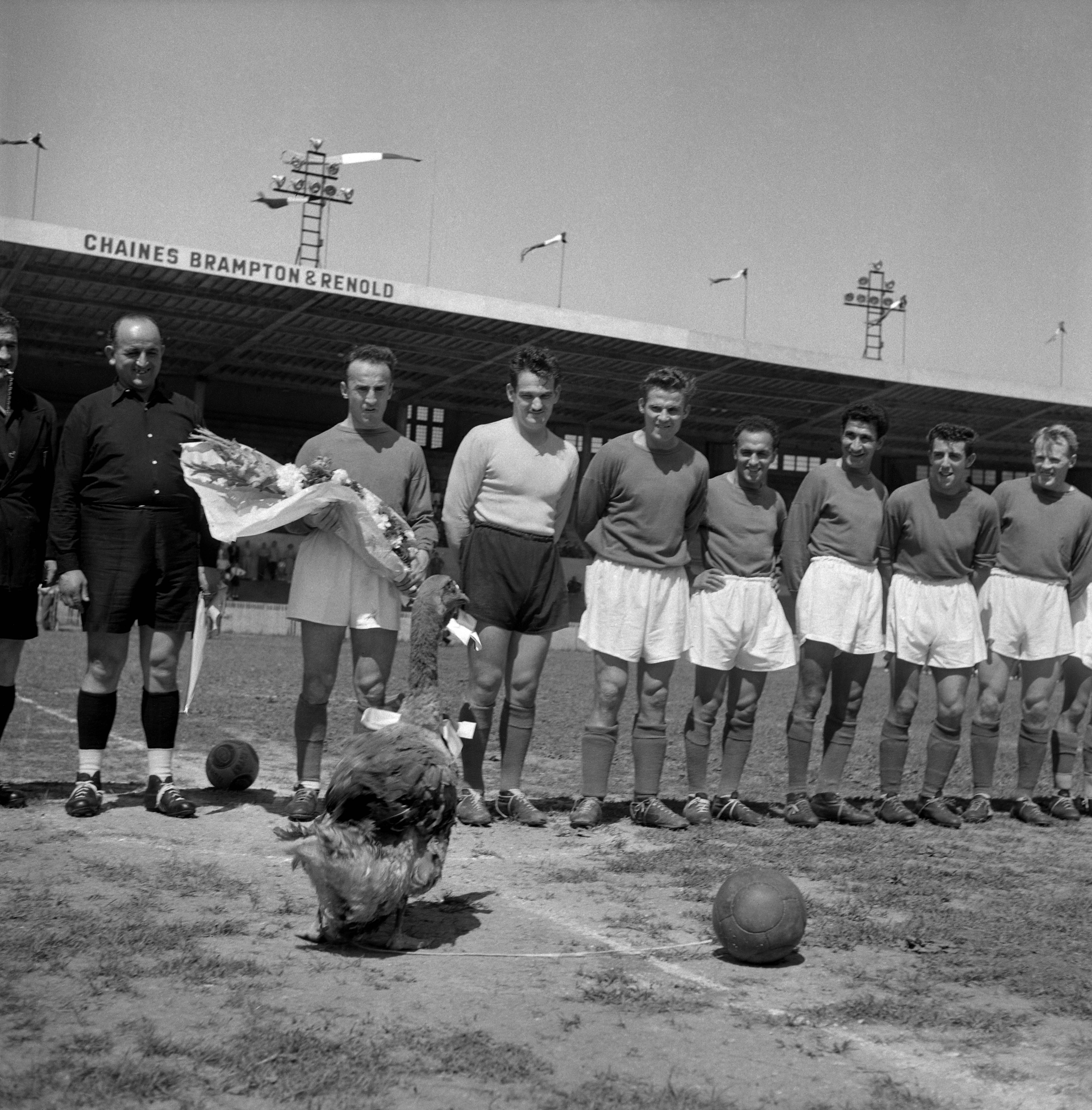 Stadium municipal de Toulouse, 1 bis allées Gabriel Biénès. 24 mai 1953. Vue de l'équipe toulousaine et de sa mascotte l'oie "Jeanne-Marie" avant le match entre le Toulouse Football Club et le Cercle Athlétique de Paris, dernière rencontre de la saison qui voit le club toulousain sacré champion de deuxième division. Joueurs présents de gauche à droite : Léon Rossi, Guy Rouxel, René Pleimelding, Abdelhamid Bouchouk, Saïd Hadad, Pierre Cahuzac, Bror Mellberg.